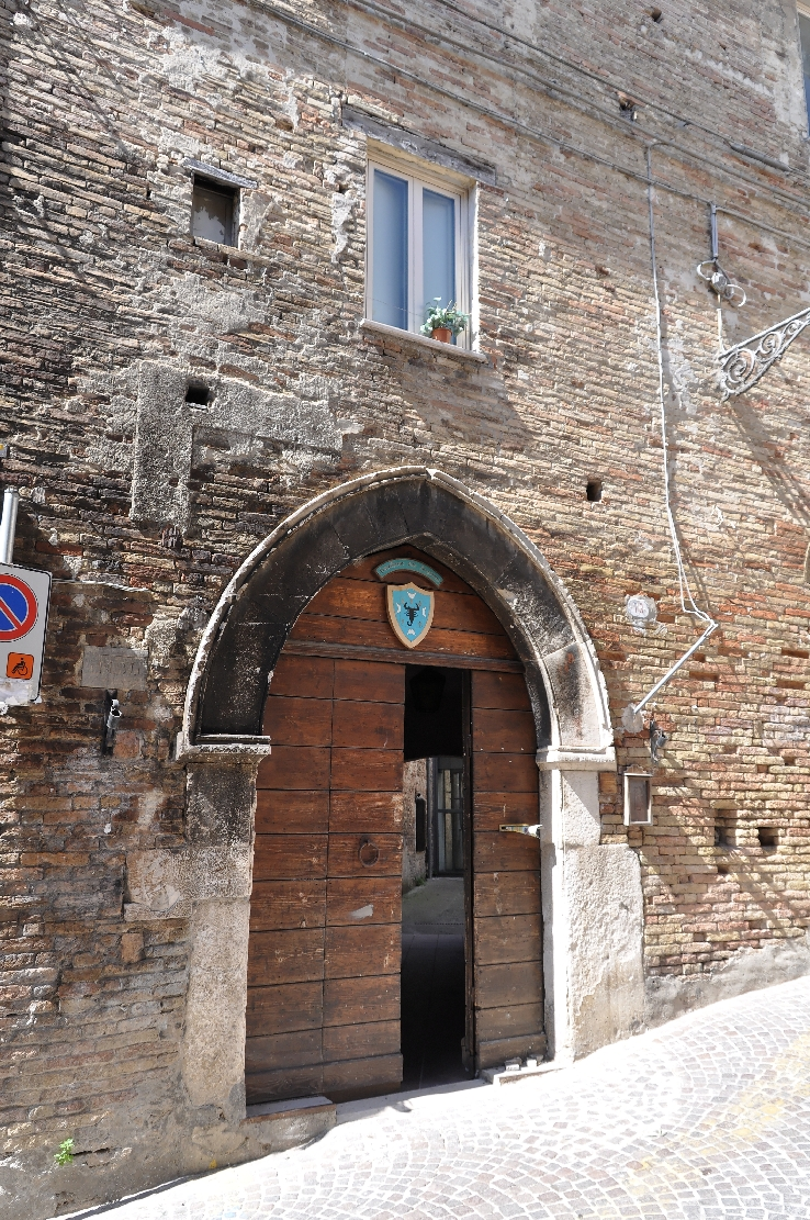 Penne (comune, Italy) 2012